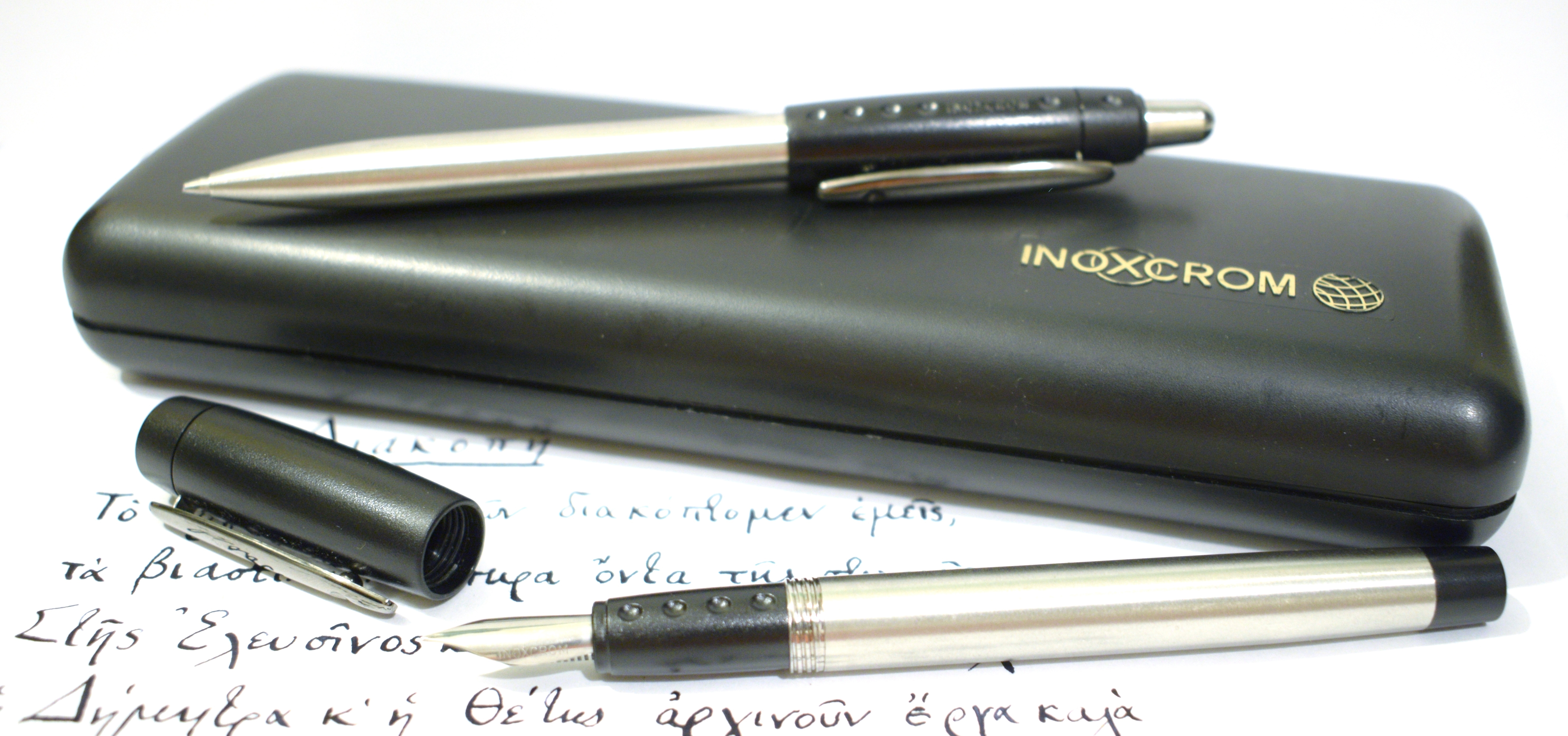 Inoxcrom ID